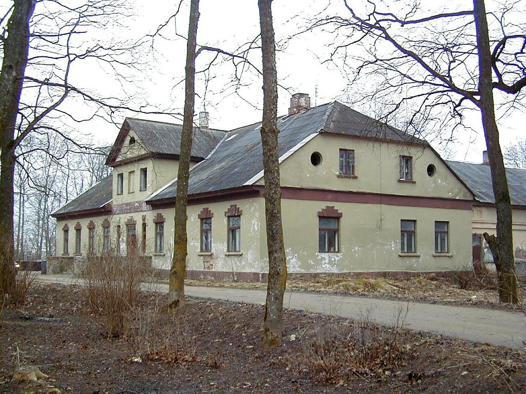 Degoles muiža 2001-03-31